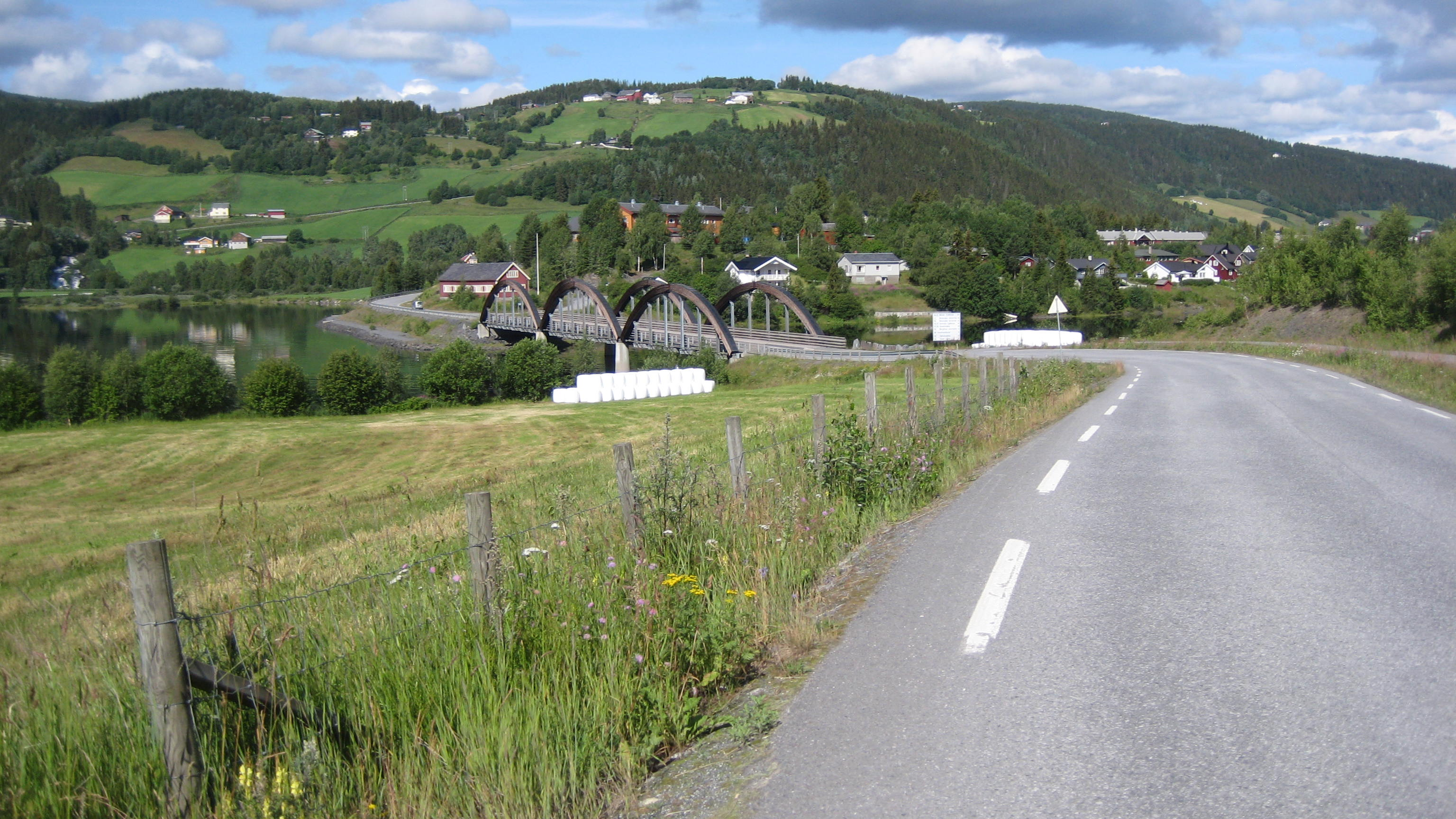 Ulnes bru på fv 2476